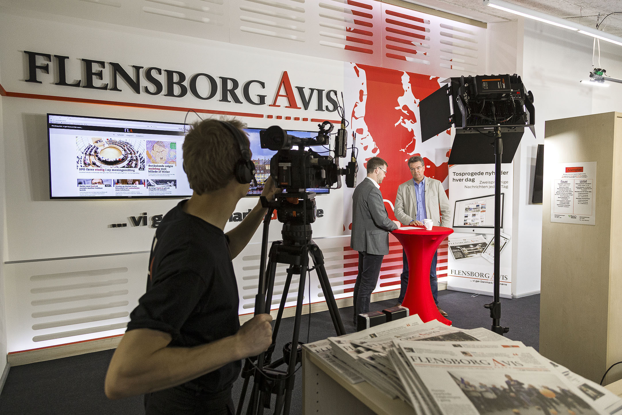 Fra avisens newsroom